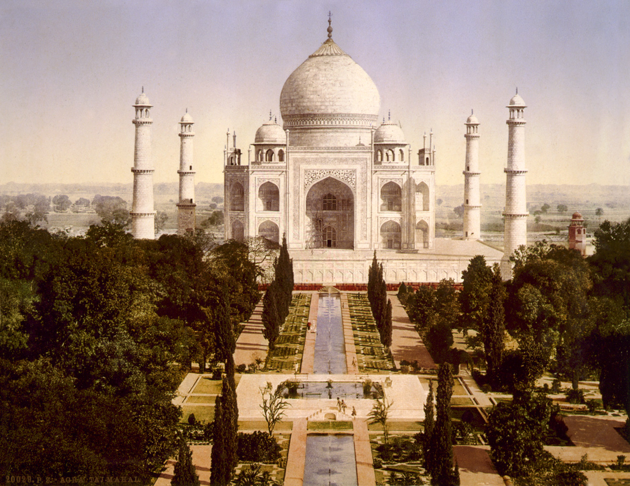 20029 P.Z. Agra, Taj Mahal.